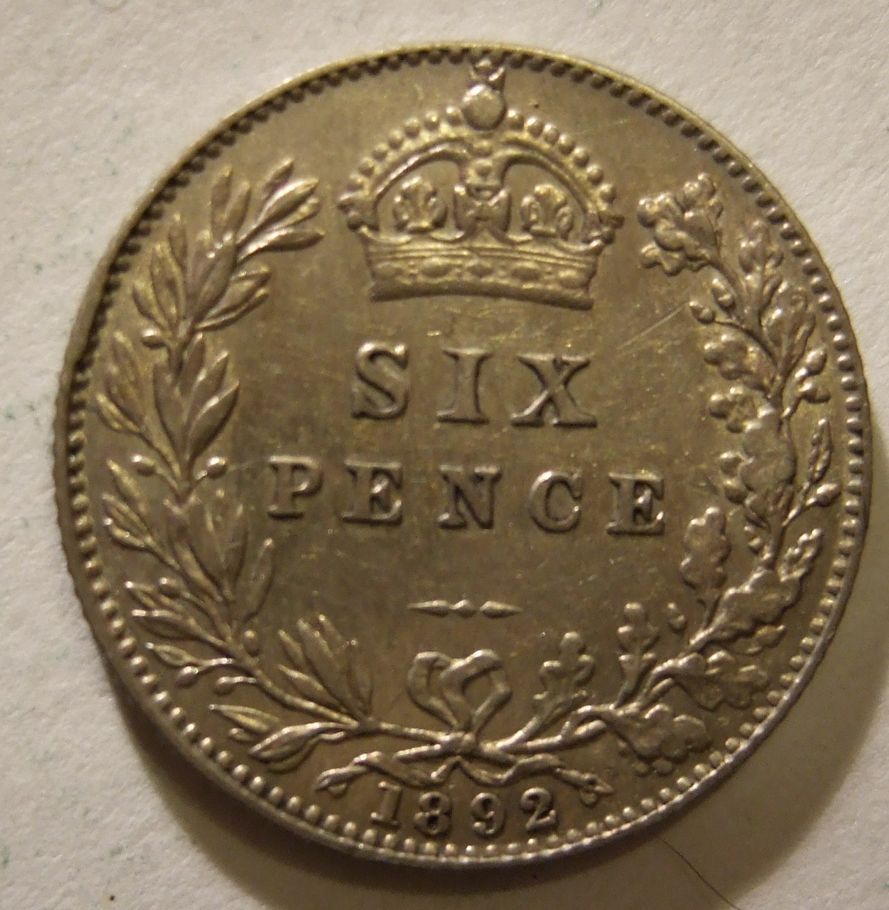 GREAT BRITAIN, VICTORIA 1892 ---SIXPENCE a